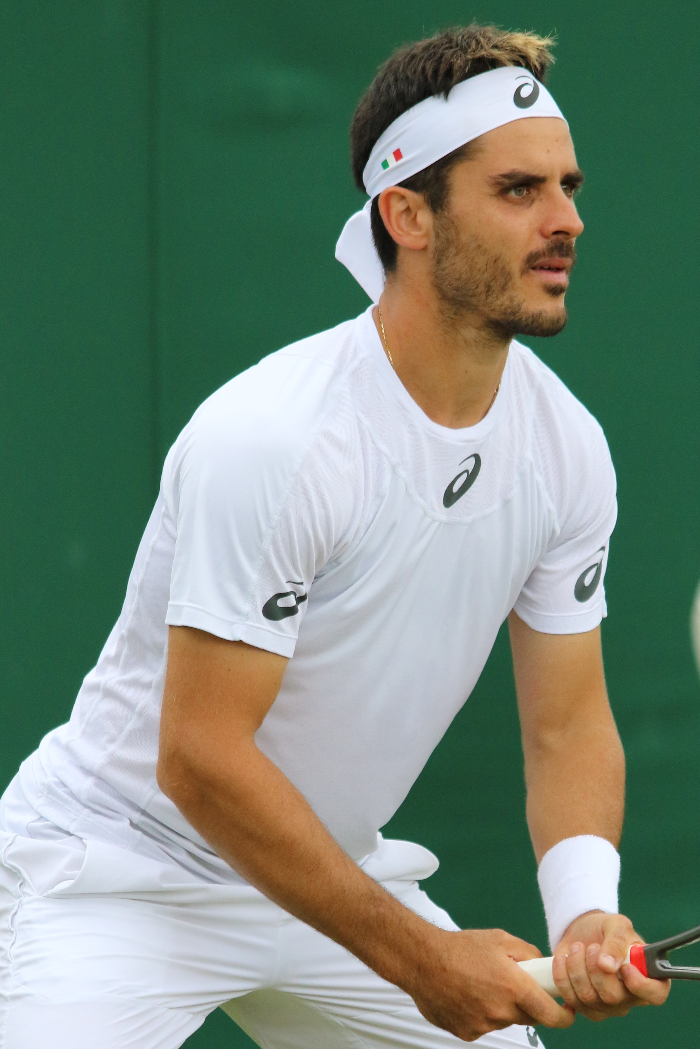 Fabbiano WM17 (6)